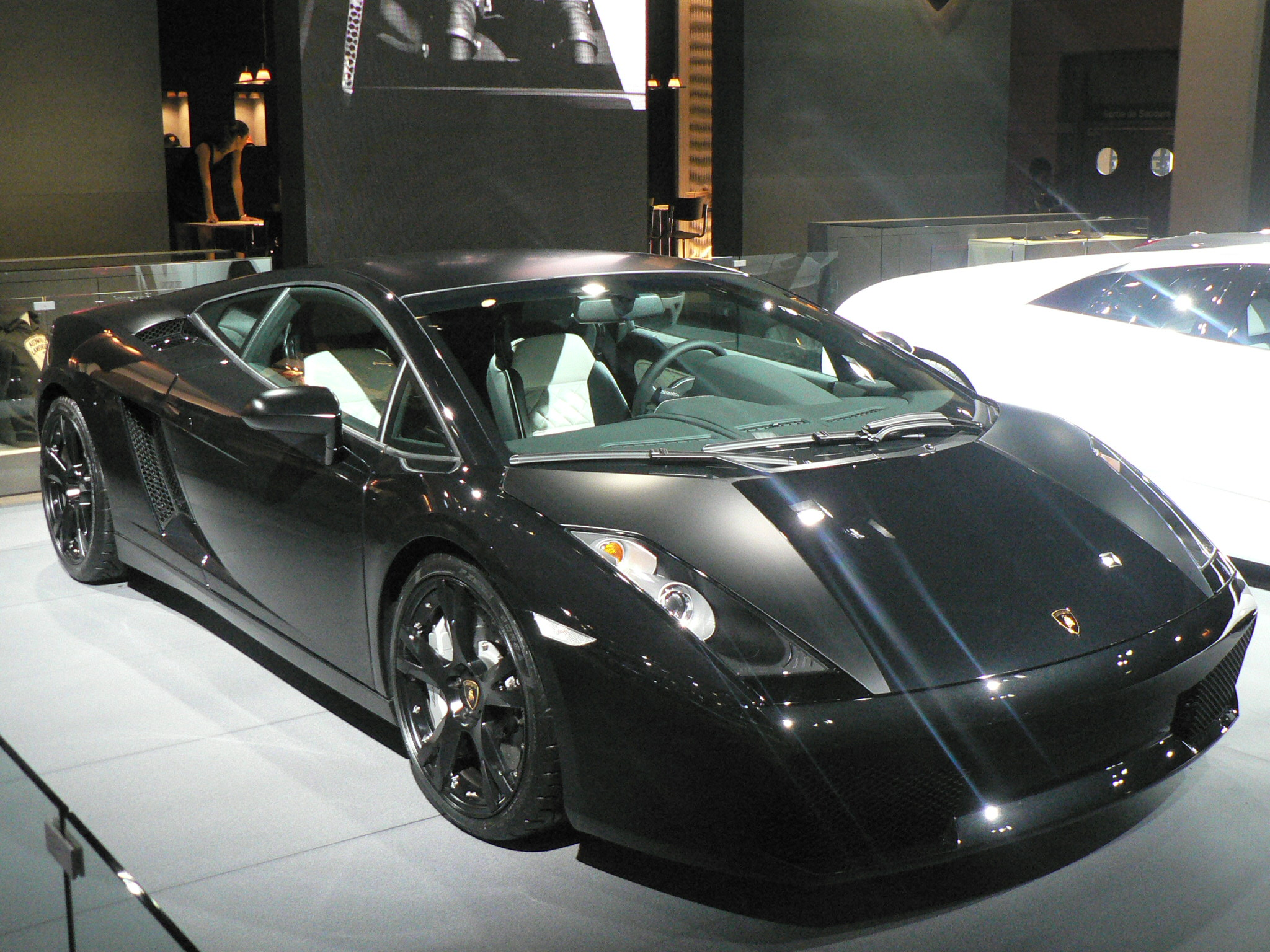 Mondial de l'automobile, Paris 2006